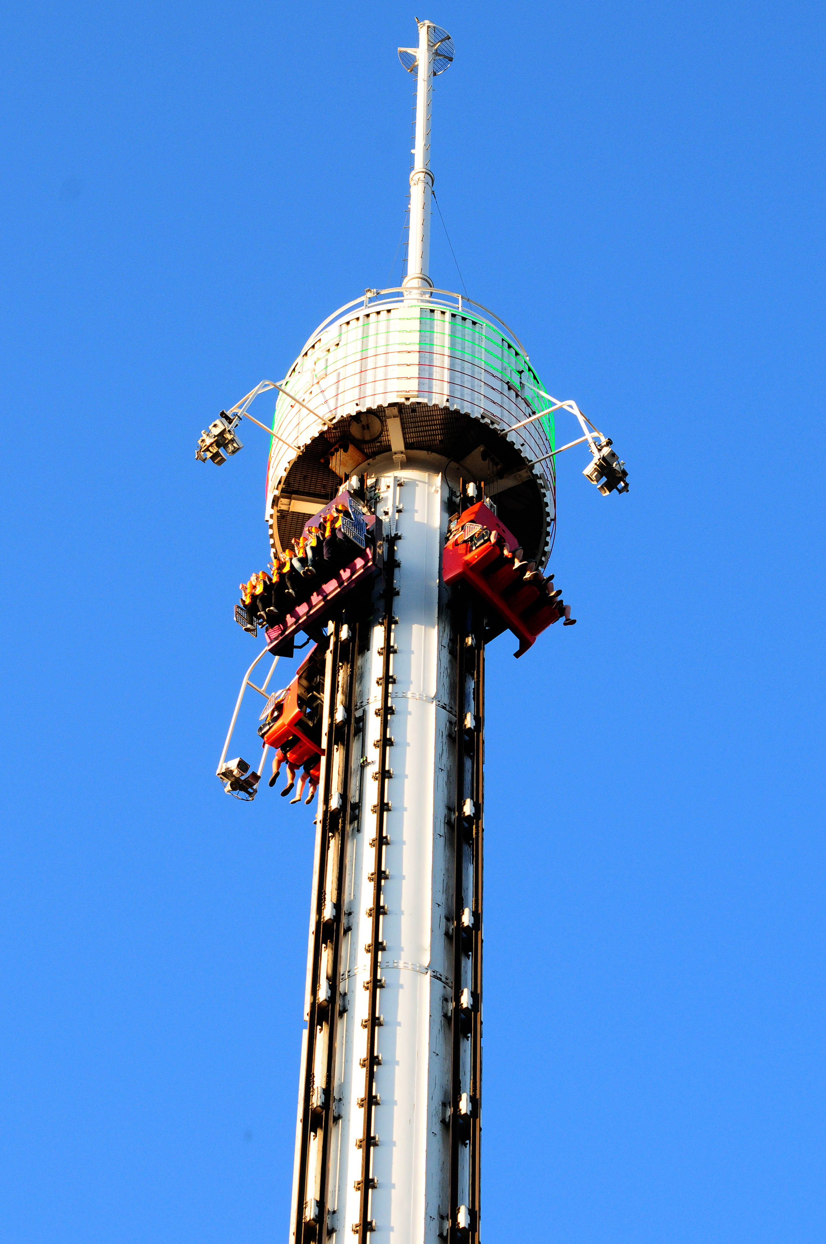 Fritt Fall Gröna Lund